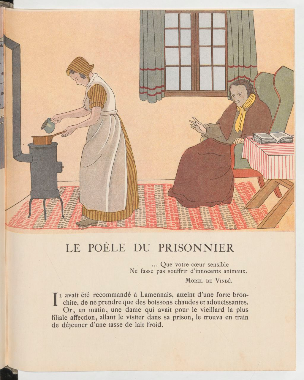 Contes et images, illustrations Marie-Madeleine Franc-Nohain : Le poêle du prisonnier, Eugène Muller, La morale en action, 1881.